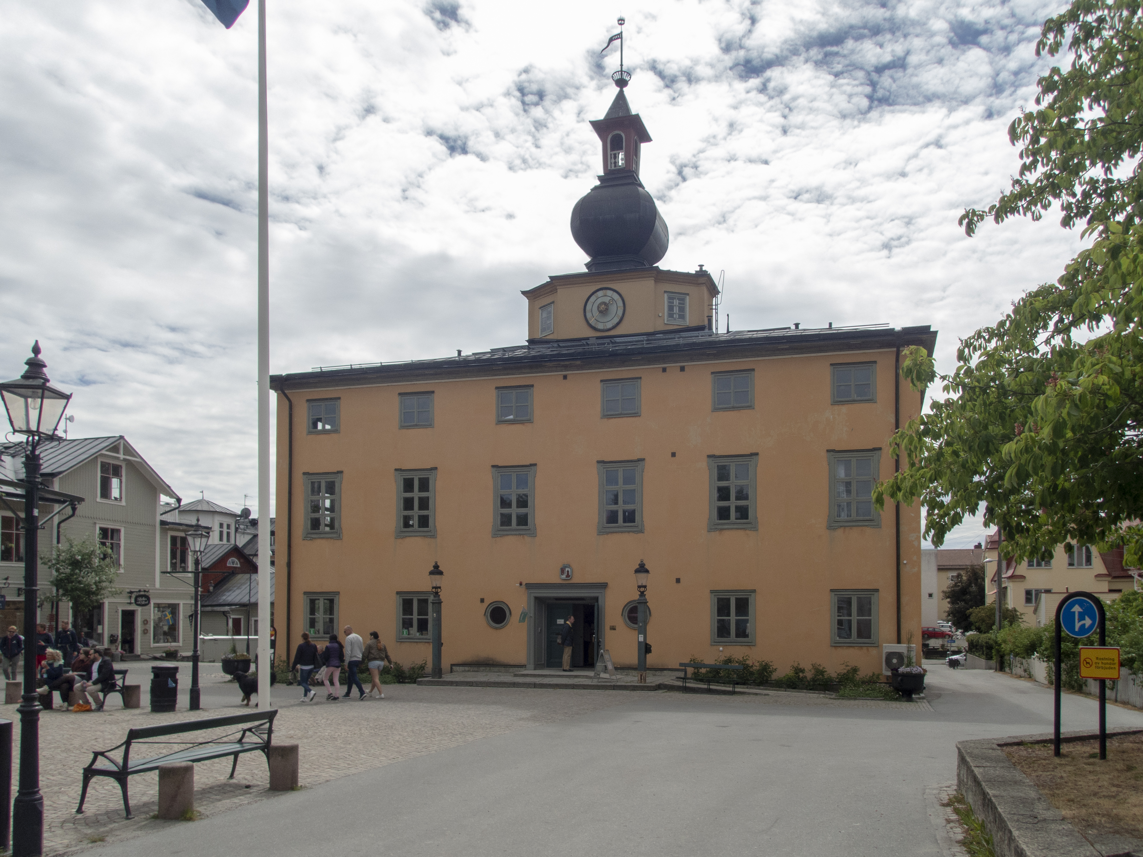 Vaxholms rådhus, Torget 1, Nybyggnadsår 1885, Ombyggt 1924 enigt Cyrillus Johanssons ritningar.